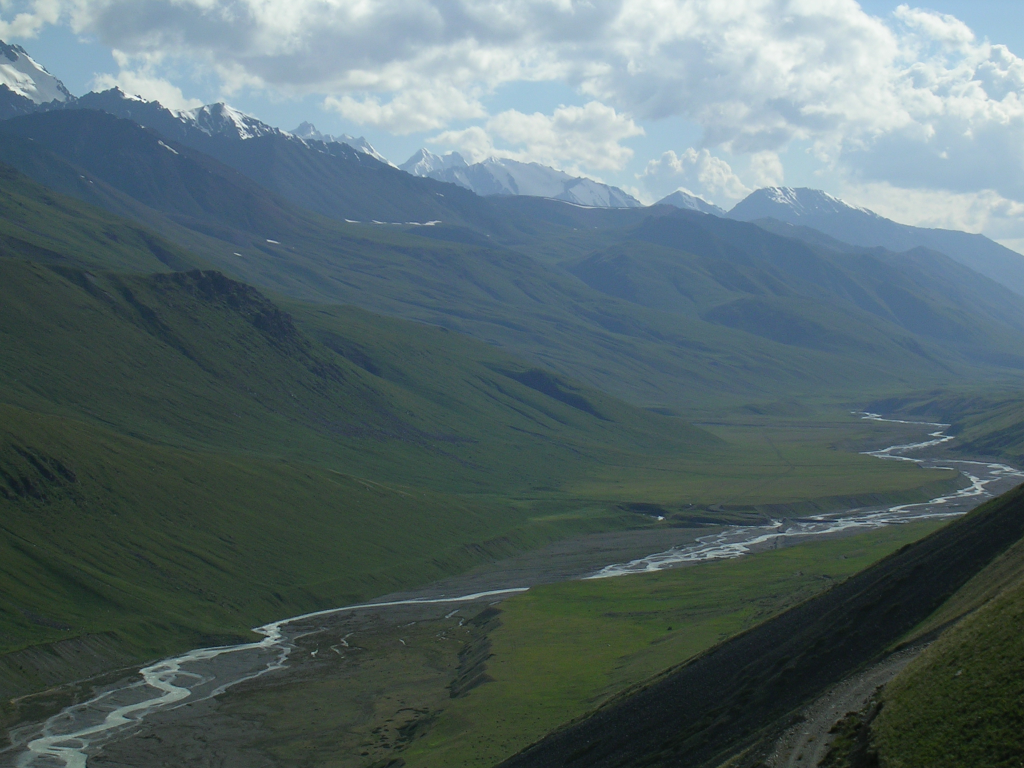 Река Чон-Кемин, Киргизия. Вид после перевала Озёрный.